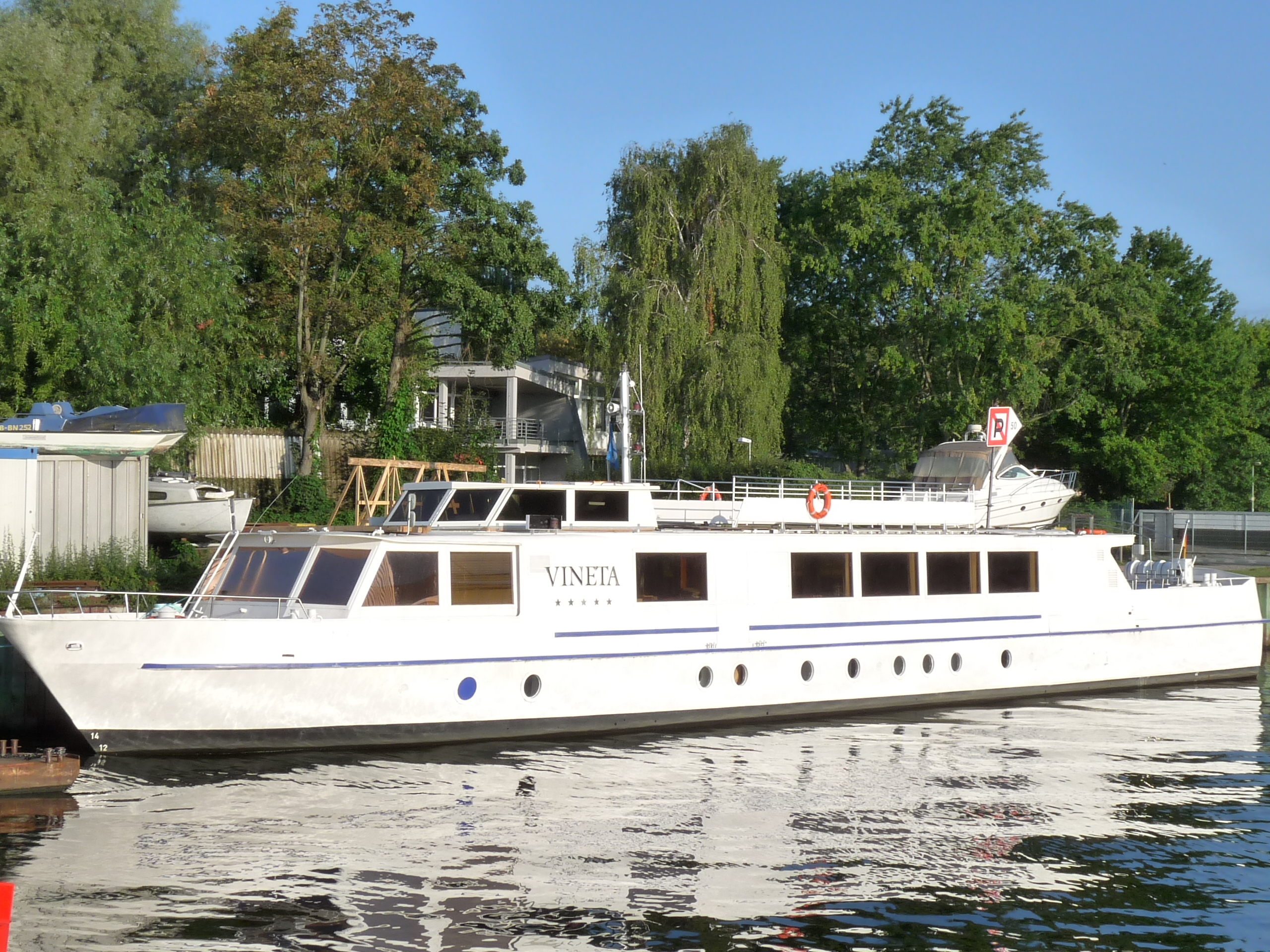 Die 1974 vom Stapel gelaufene Albin Köbis ist eine deutsche Motoryacht und ehemalige Staatsyacht der DDR. Sie wurde nach dem Matrosen Albin Köbis benannt, der wegen Beteiligung an einer Meuterei während des Ersten Weltkriegs hingerichtet wurde. Seit 1994 gehörte sie unter dem Namen Vineta dem Werfteneigner Detlef Hegemann. Als Teil der Insolvenzmasse der Stralsunder P+S Werften stand das Schiff dann zum Verkauf. Am 7. Dezember 2014 wurde die Yacht für 130.000 Euro versteigert.